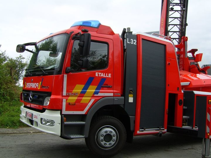 autoechelle MB Etalle